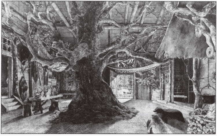 Heinrich Christoph Gottlieb Breling (1849-1914). Хижина Гундинга. 1882 г. Акварель.